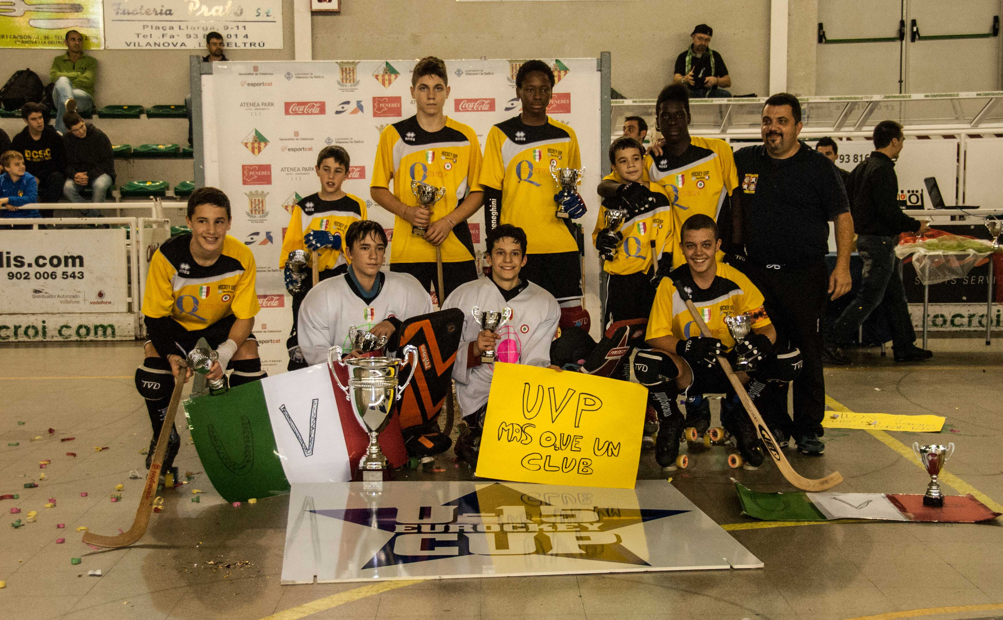 UVP-Mirandola-e-Módena